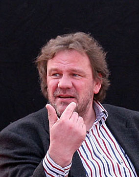 Rolf Bauerdick auf der Leipziger Buchmesse